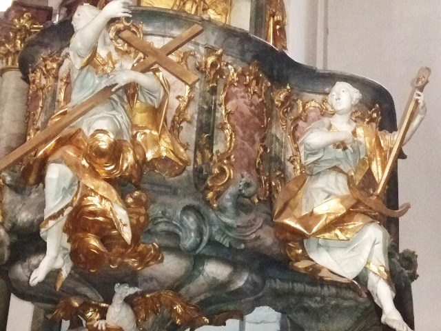 Studienkirche Mariä Himmelfahrt, Dillingen an der Donau Kanzel, Detail